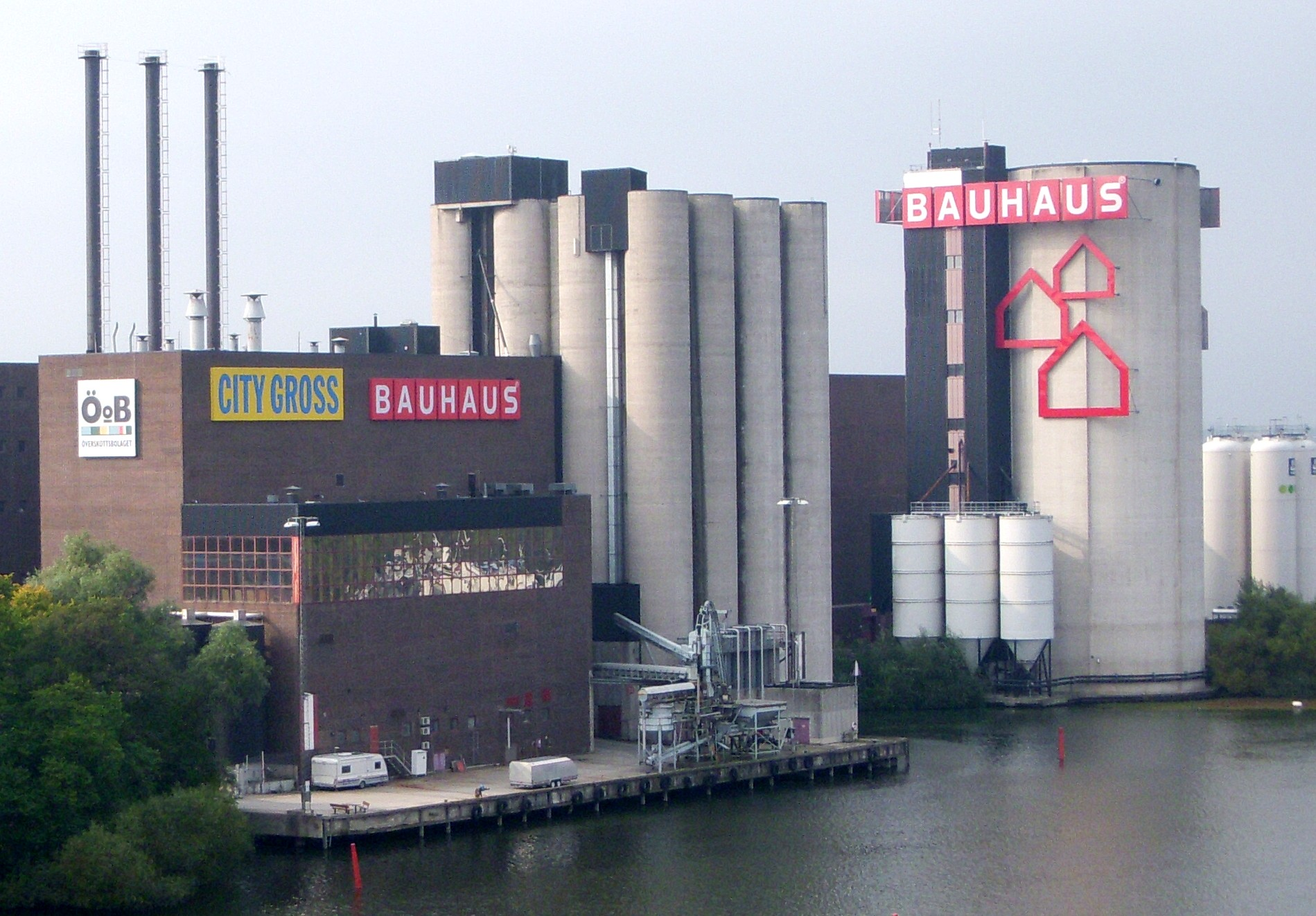 Bauhaus Bromma, Stockholm